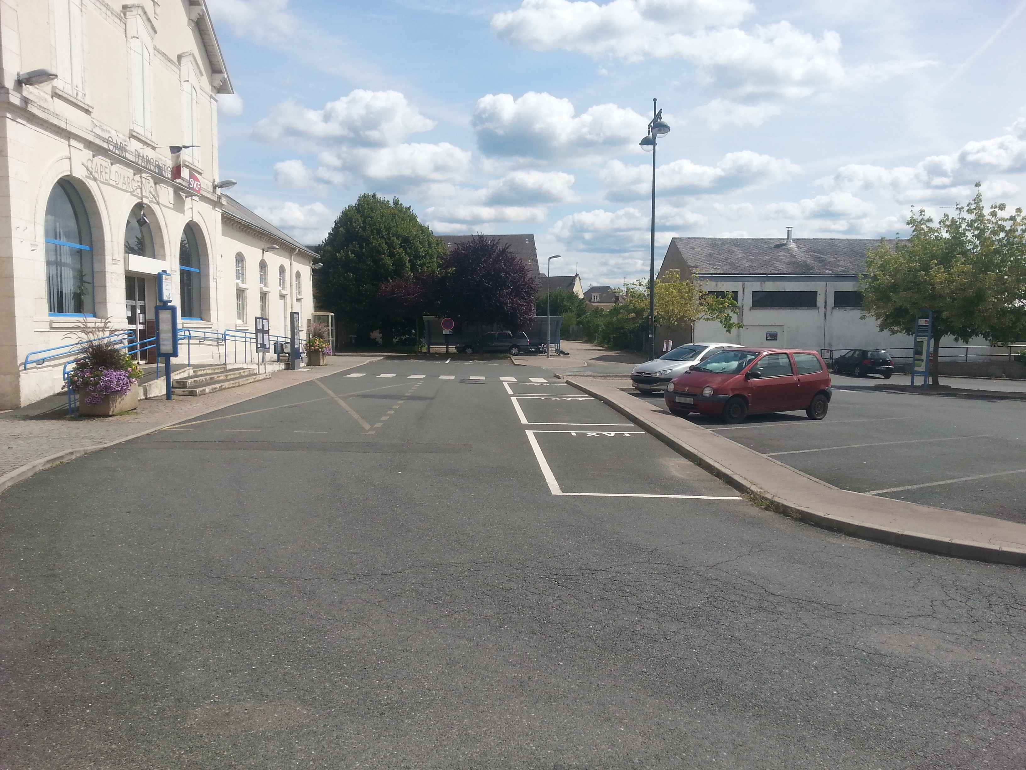 Gare d'Argenton-sur-Creuse (36) : Le parking des taxis.